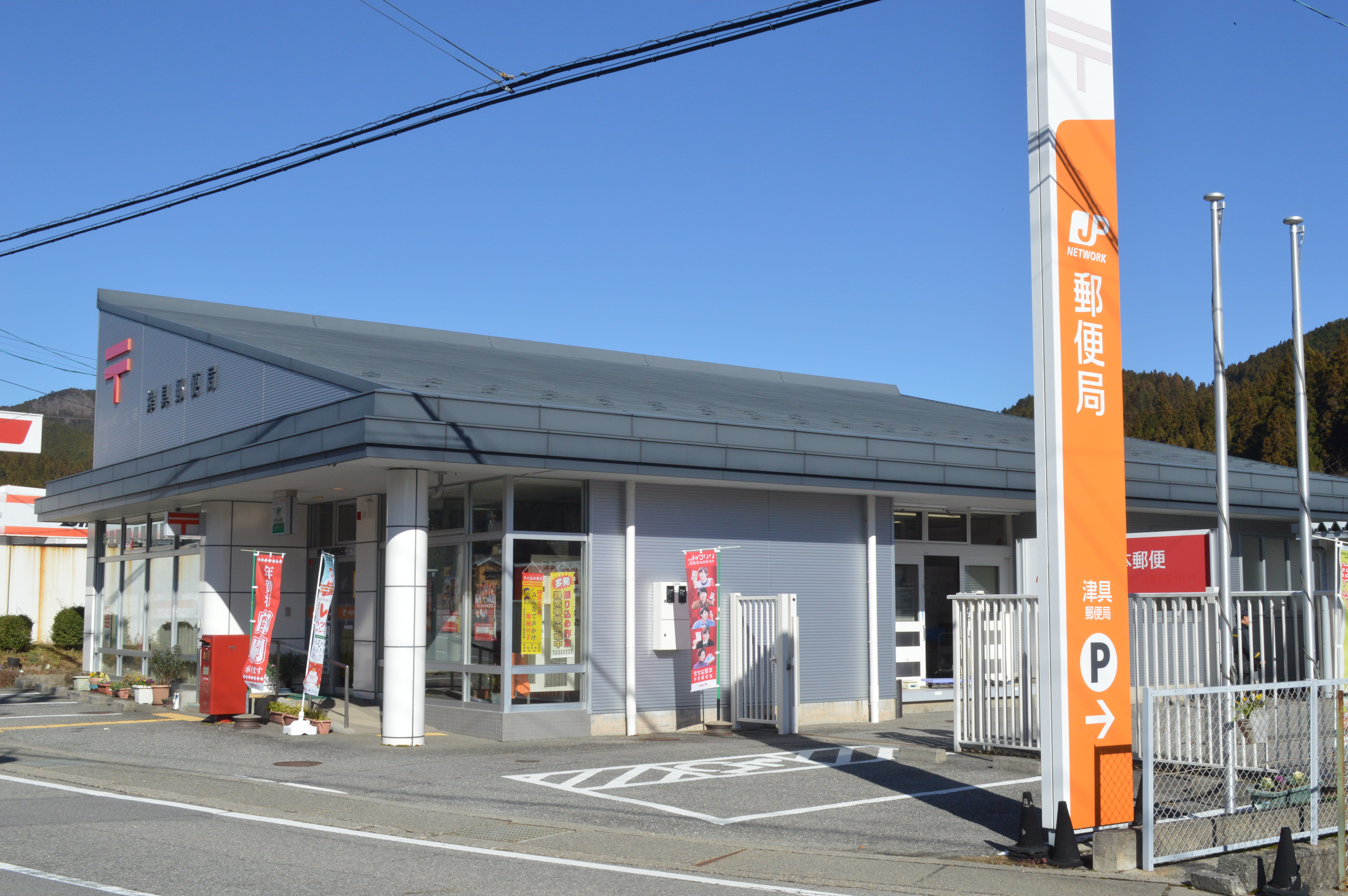 愛知県北設楽郡設楽町津具にある津具郵便局。